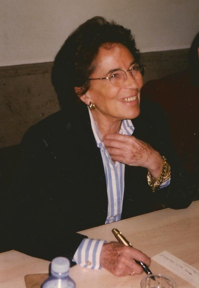 Françoise Giroud à une journée dédicaces.